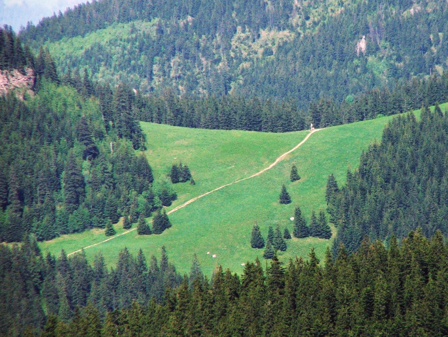 Przysłop Miętusi - widok z Polany Stoły (Tatra Mountains)